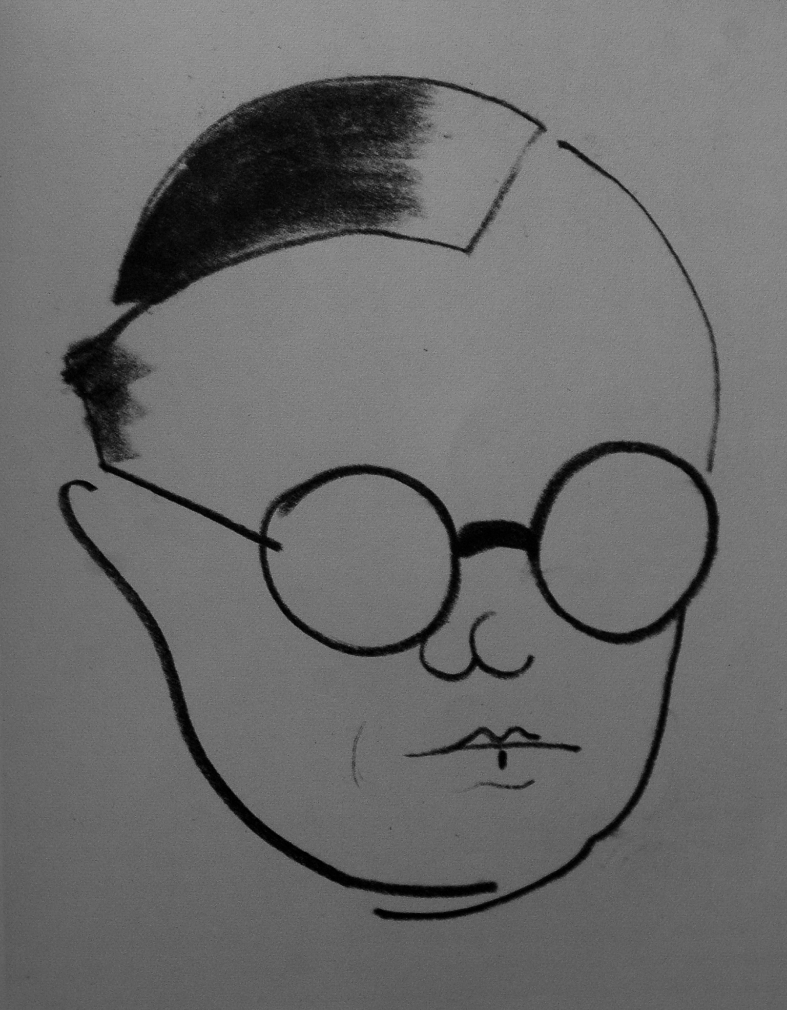 Robert Högfeldt. Karikatyrteckning av konstnärsvänner utförd av konstnären John Jon-And, utgiven postumt efter hans död 1941 i boken Konstnärer Gebers Förlag.